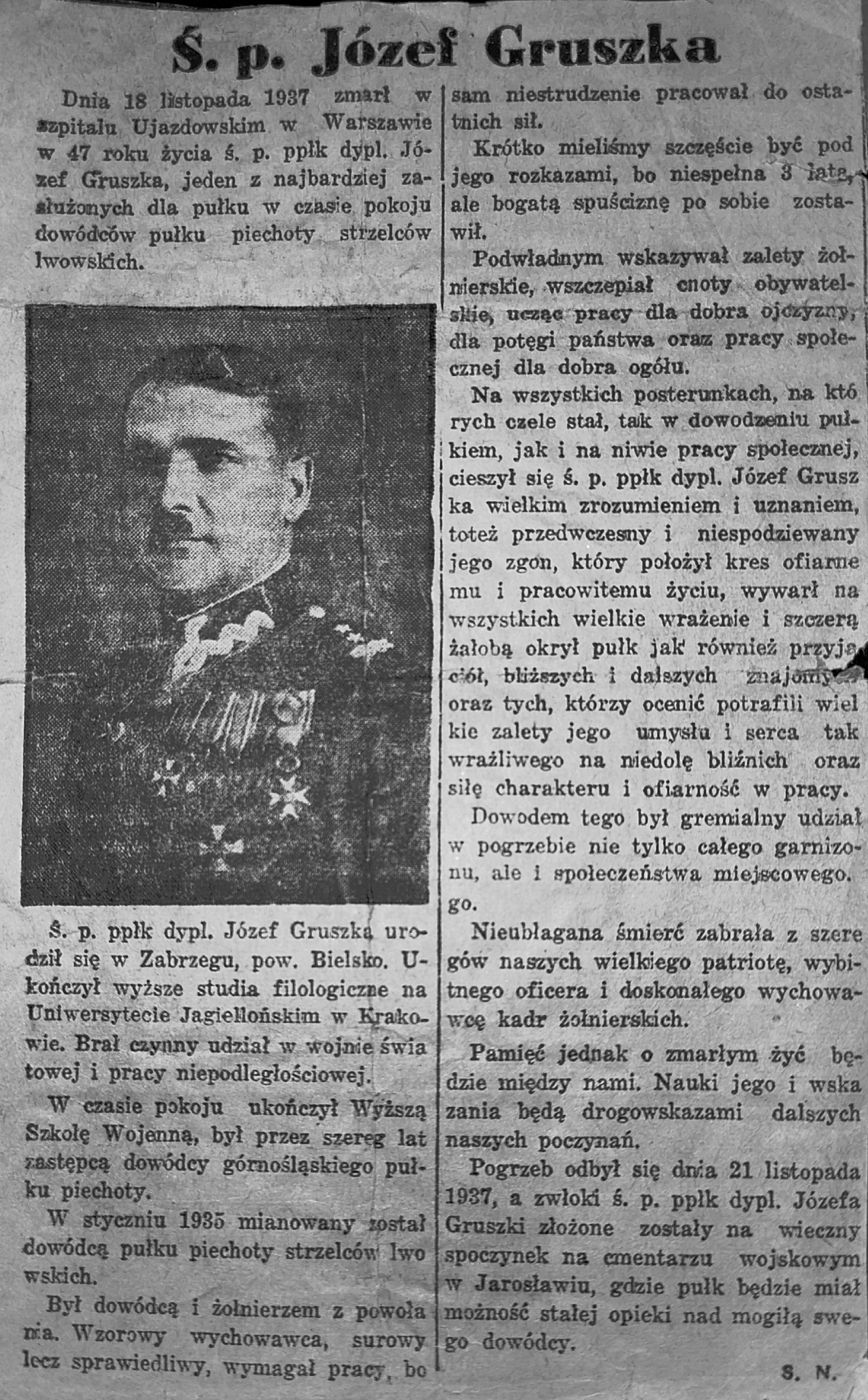 Nekrolog z czasopisma